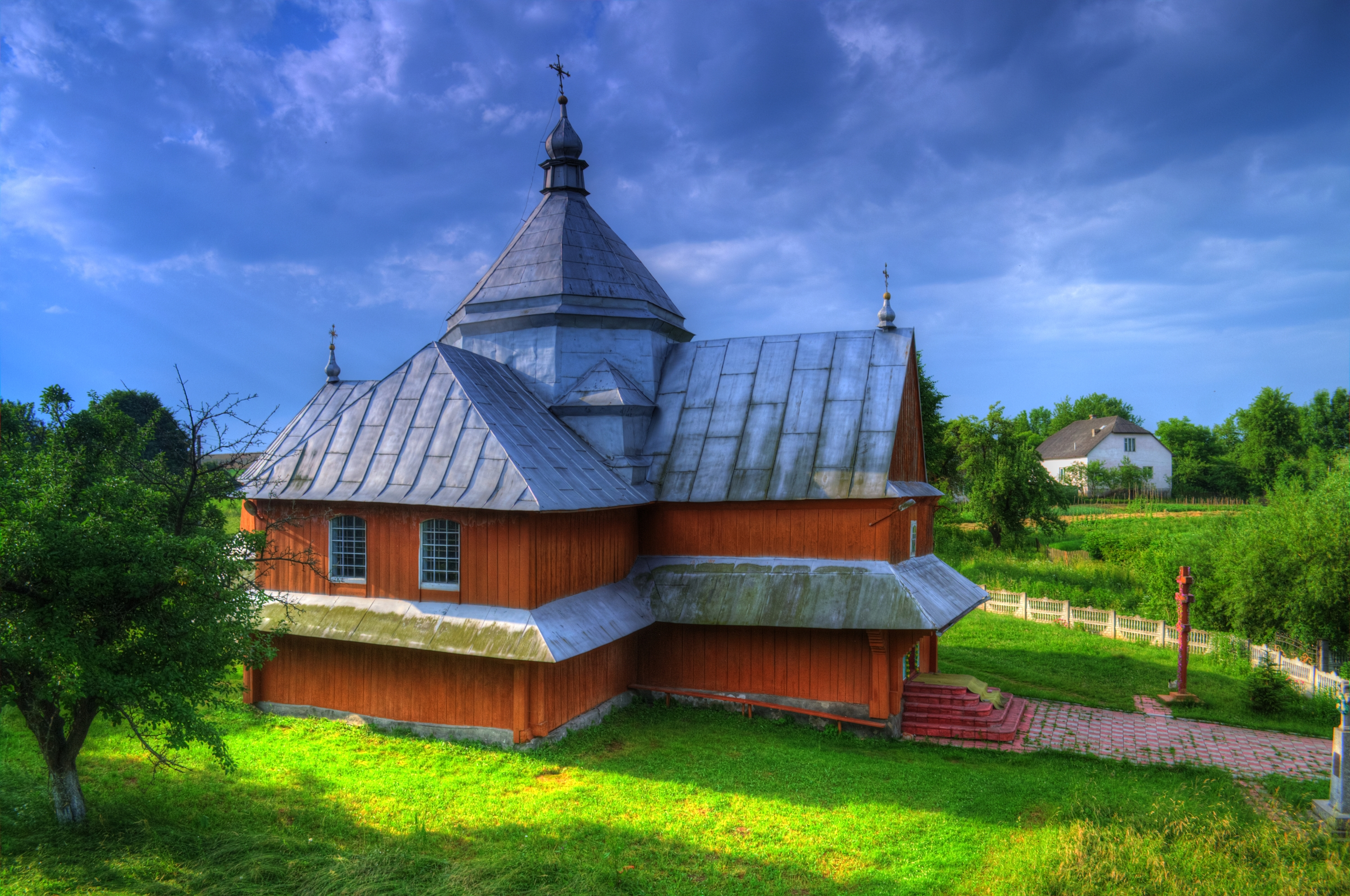 Вид з дзвіниці на церкву